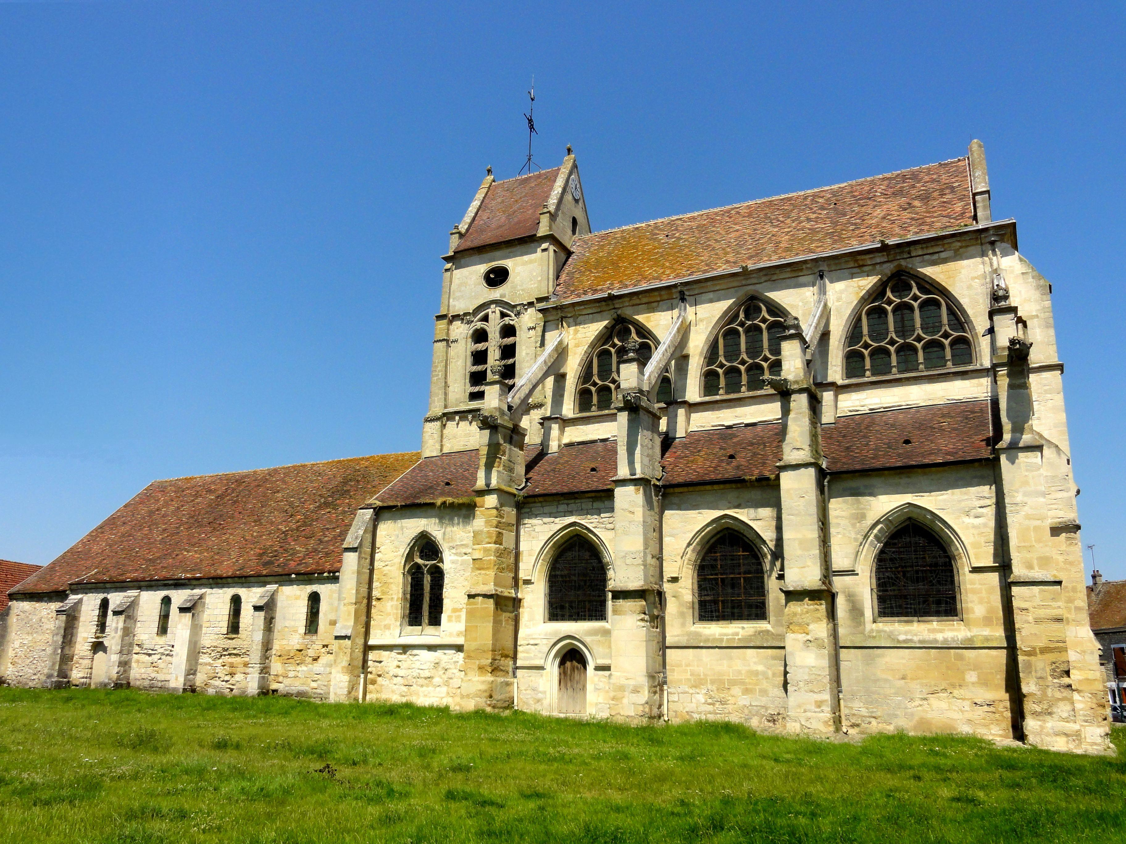 Elévation sud.